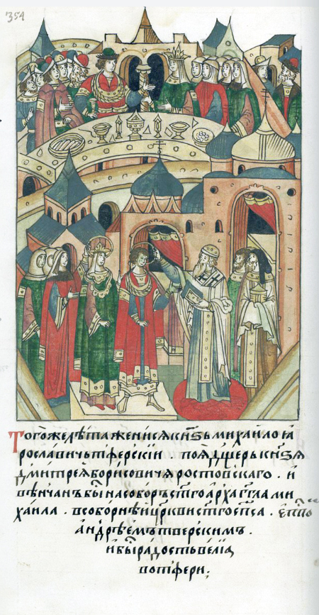 ЛИЦЕВОЙ ЛЕТОПИСНЫЙ СВОД В том же году женился князь Михайло Ярославич Тверской, взял дочь князя Дмитрия Борисовича Ростовского и венчан был на (праздник) Собора святого архангела Михаила в соборной церкви святого Спаса епископом Андреем Тверским; и была радость великая в Твери.